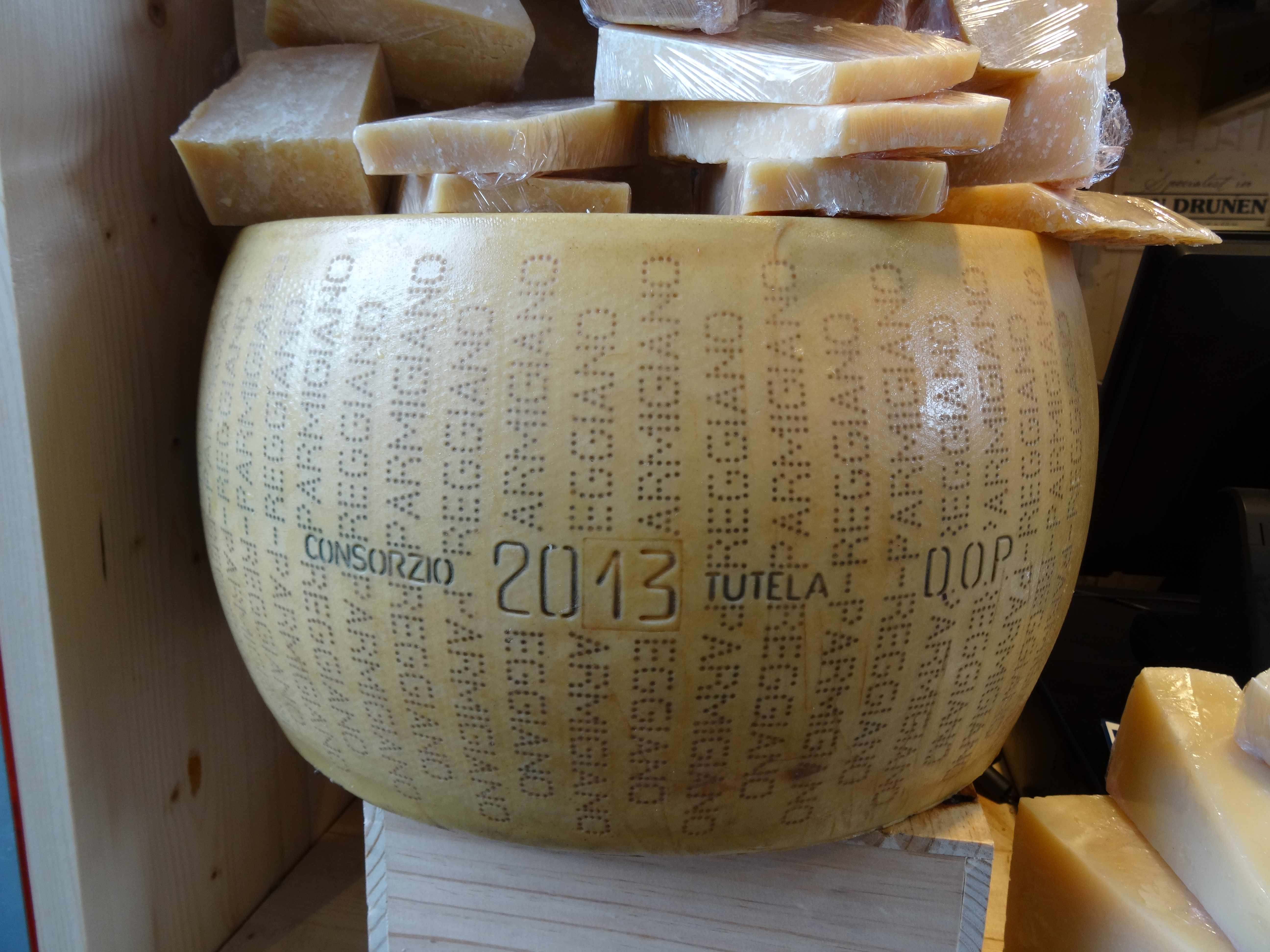 Parmigiano-Reggiano gemerkt door het Consortium Parmigiano-Reggiano. 2013.